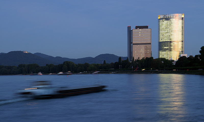 Blick von der Bonner Rheinpromenade in Richtung Siebengebirge. Hinten links ist auf dem Petersberg das Gästehaus des Bundes zu erkennen. Rechts im Bild das ehemalige Abgeordnetenhochhaus und heutiger Hauptbestandteil des UN-Campus im Bundesviertel und der Post Tower, die Hauptverwaltung der Deutschen Post AG.